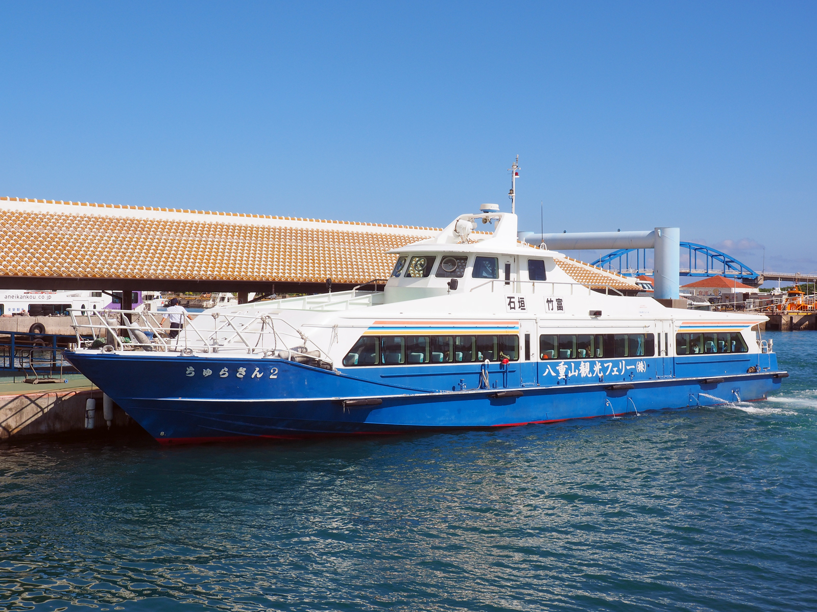 八重山観光フェリーのちゅらさん2（沖縄県石垣市の石垣港にて）